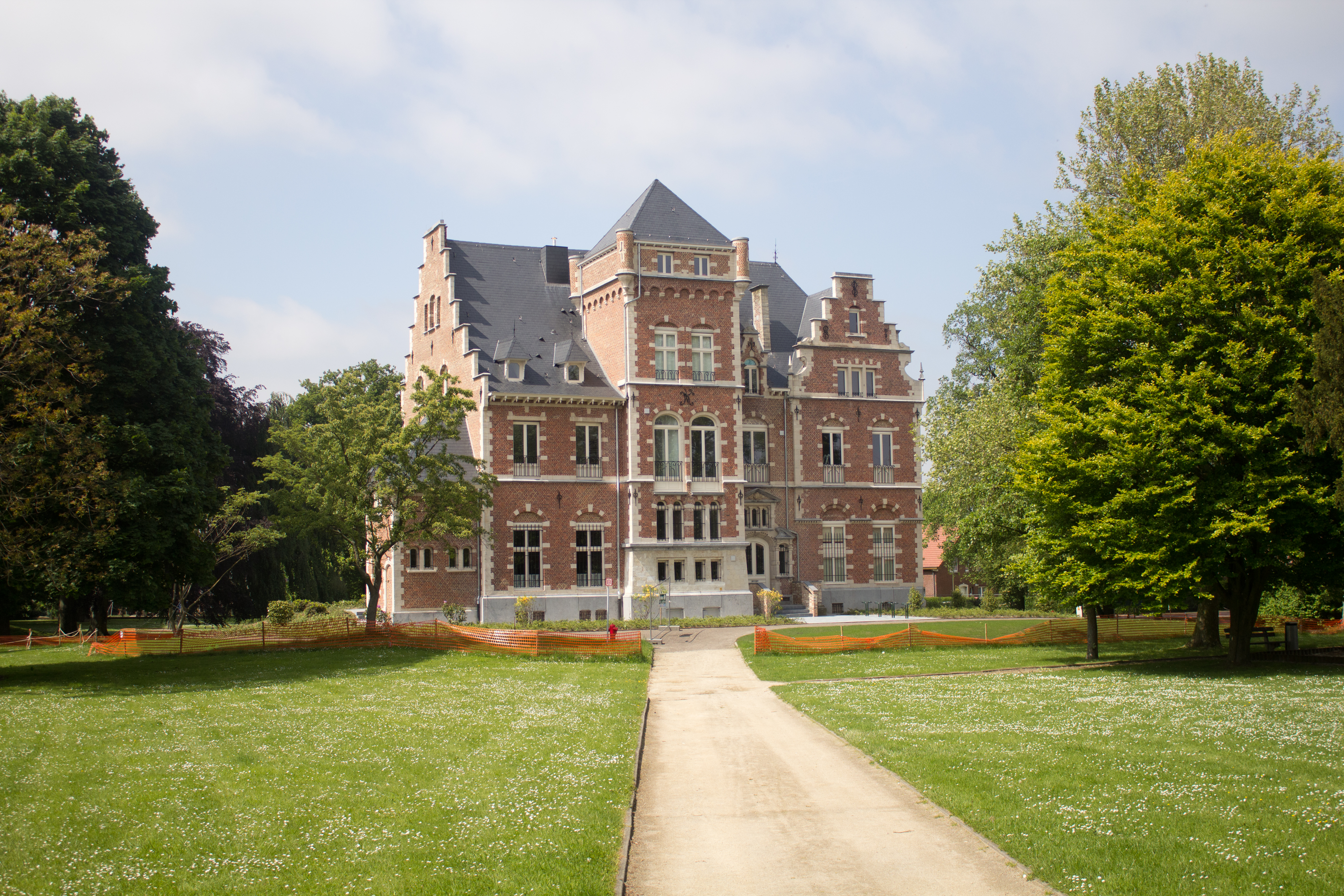 Kasteel d'Exaerde na renovatie, Humelchem.